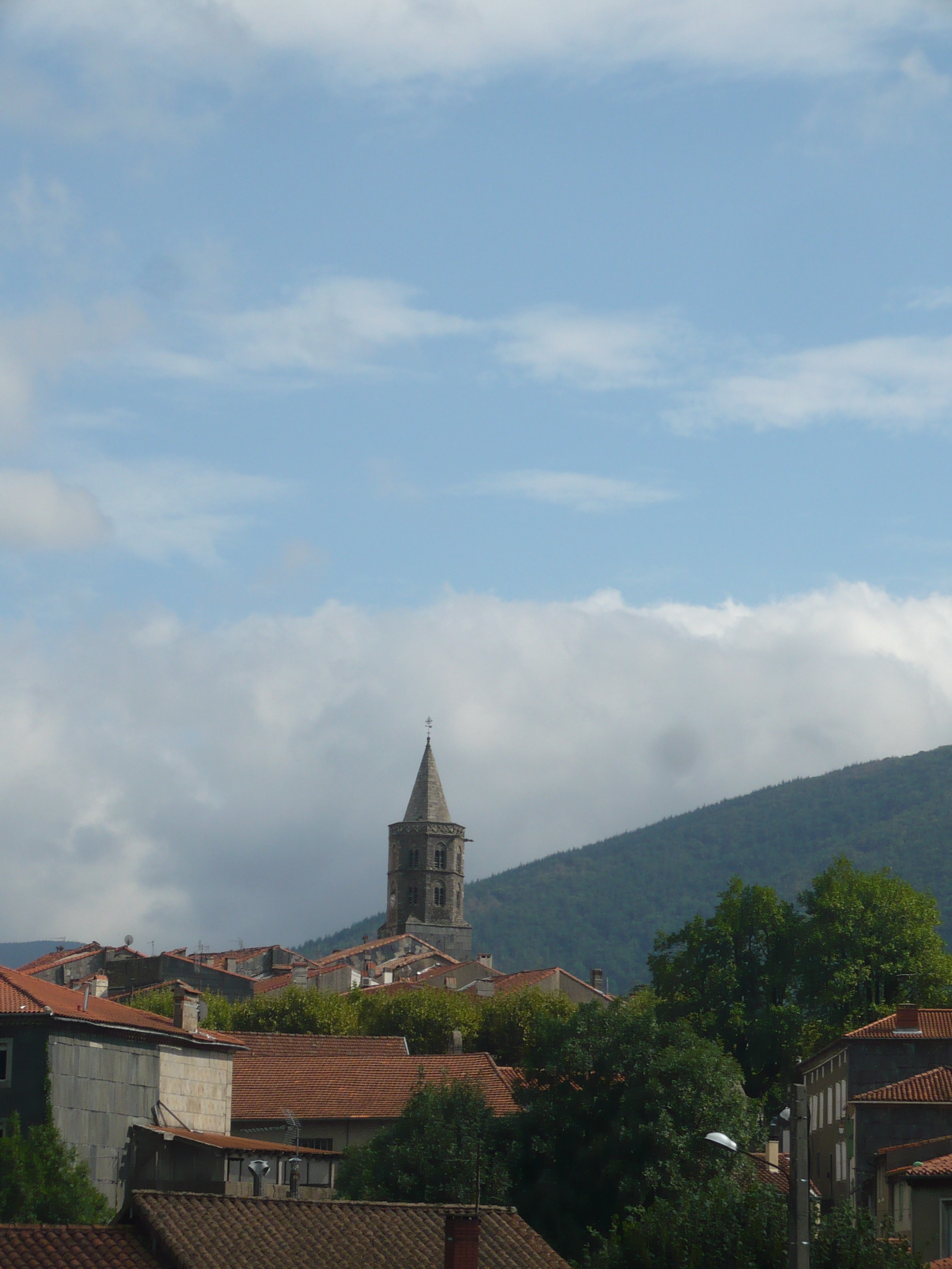 Église Notre-Dame de l'Assomption du XVIIIe siècle et Montagne Noire sur la commune de Saint-Amans-Soult dans le département français du Tarn.